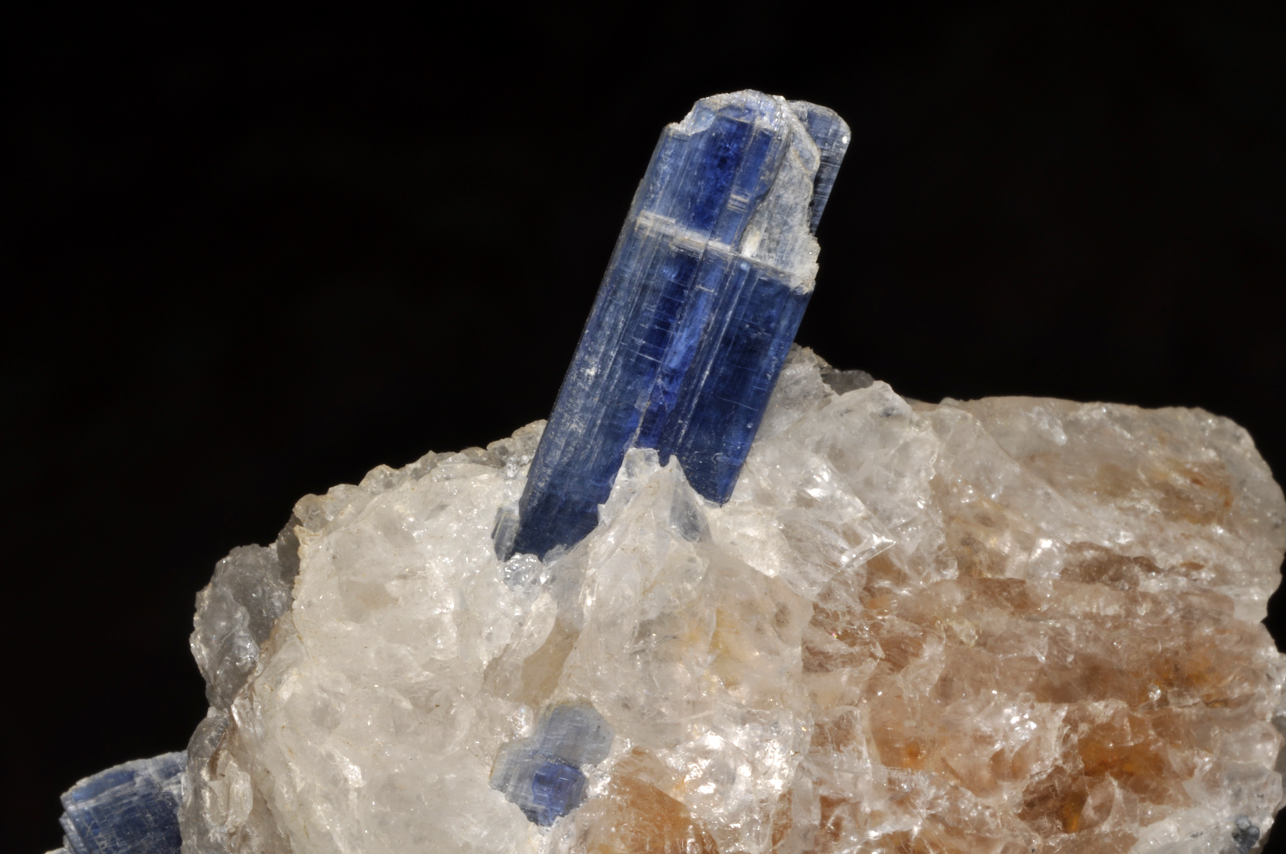 cristal de disthène (cyanite) sur gangue